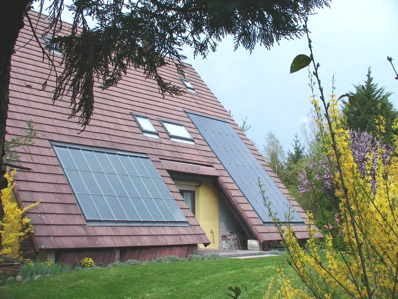 Intégration en toiture de panneaux solaires thermiques (10 m²) et photovoltaïques (20 m²)